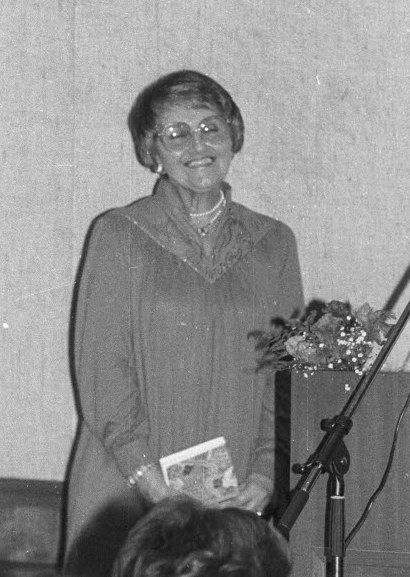 Buchlesung mit der Schauspielerin und Autorin Irmgard Harder in der Schalterhalle. Am Redepult ihr Verleger Ingwert Paulsen jr. aus Husum